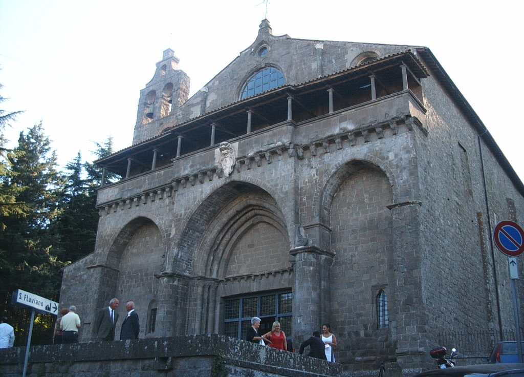 Montefiascone. chiesa di san flaviano. foto di Vinc81. agosto 2005